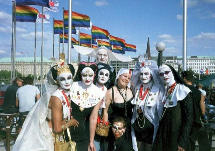 Schwestern und Nonnen der Häuser Berlin, Hamburg und Köln